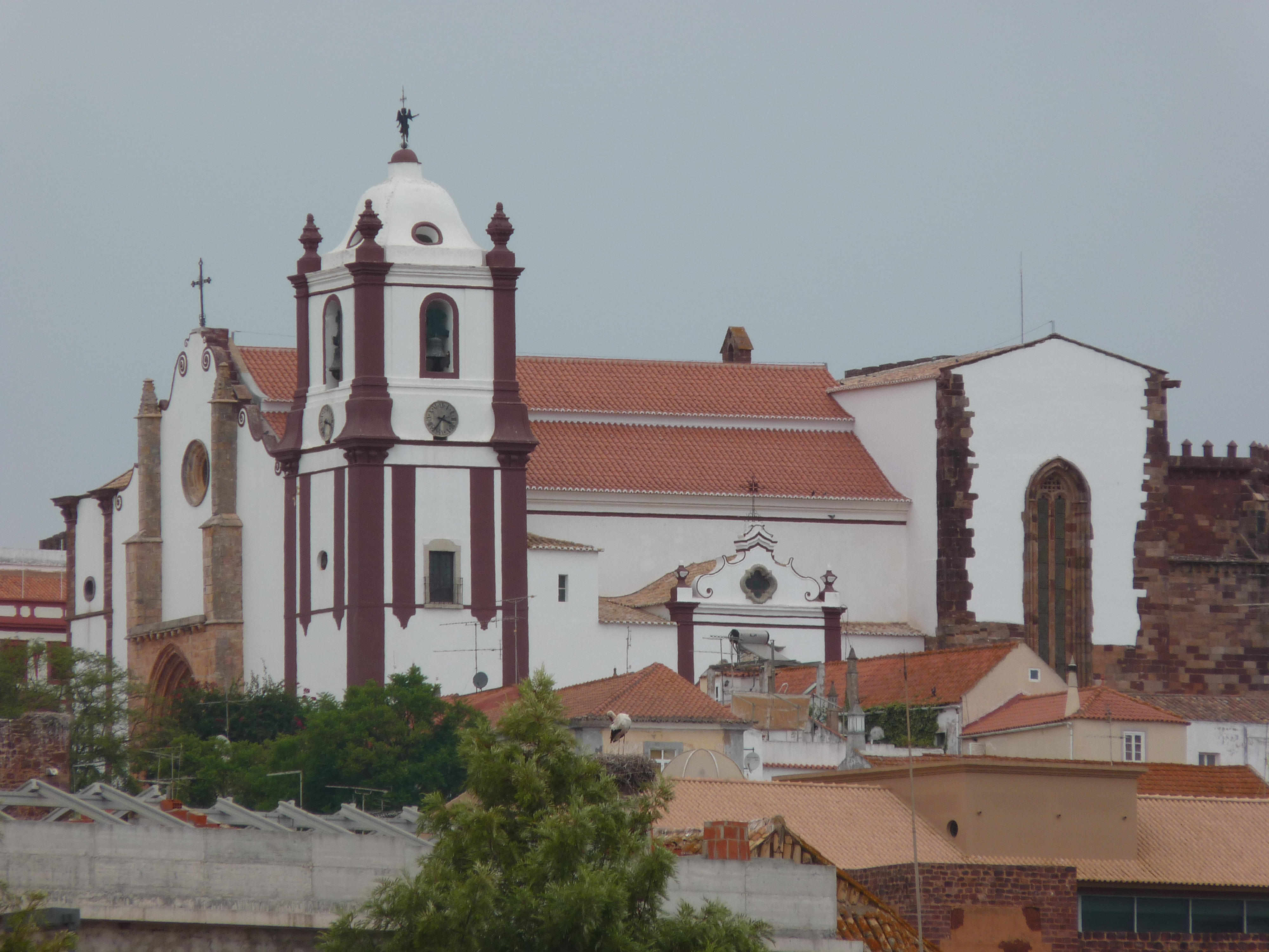 Église de Silves vue du coté du fleuve.